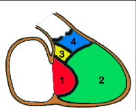 Embryologie du septum interventriculaire